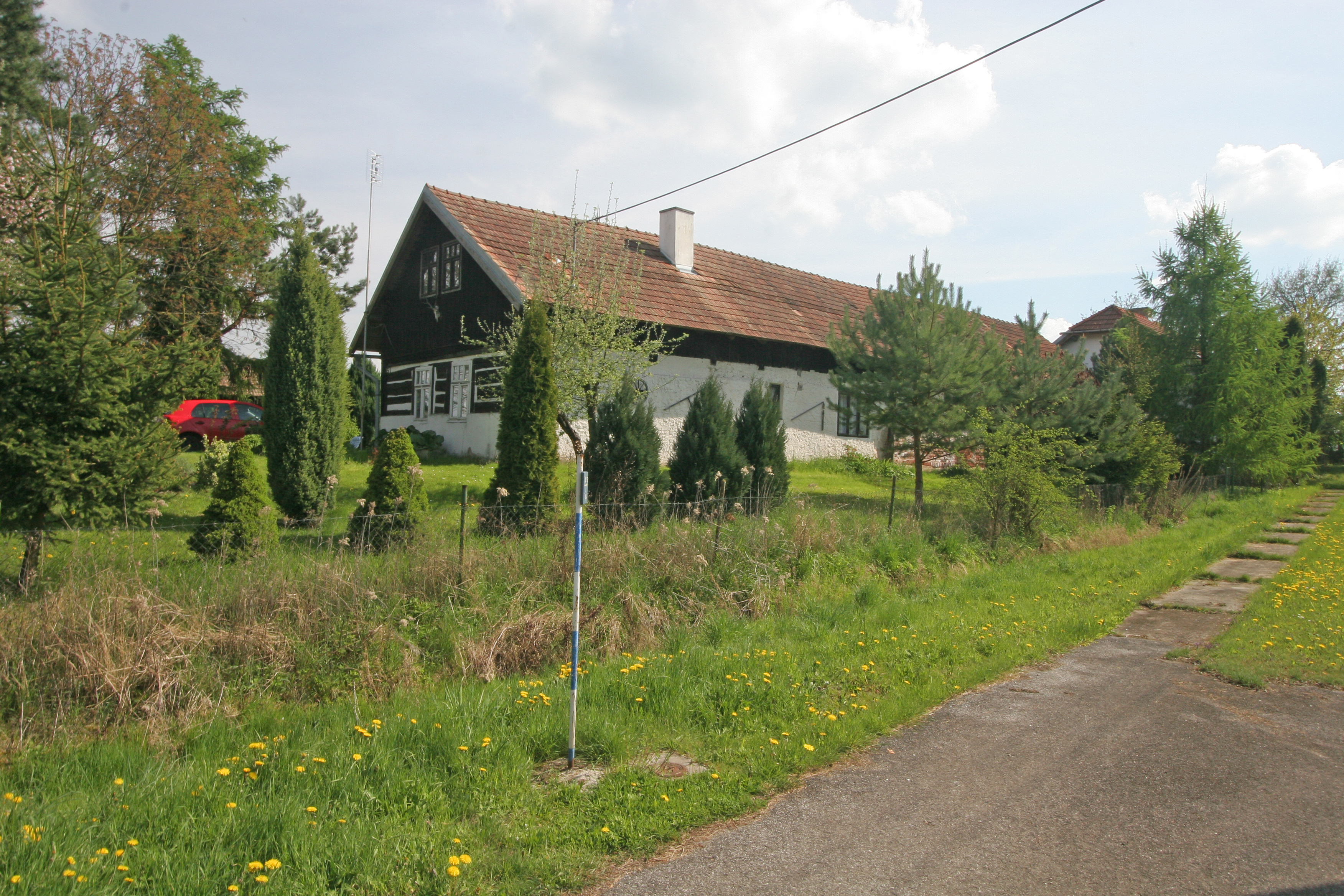 Slavhostice čp. 51